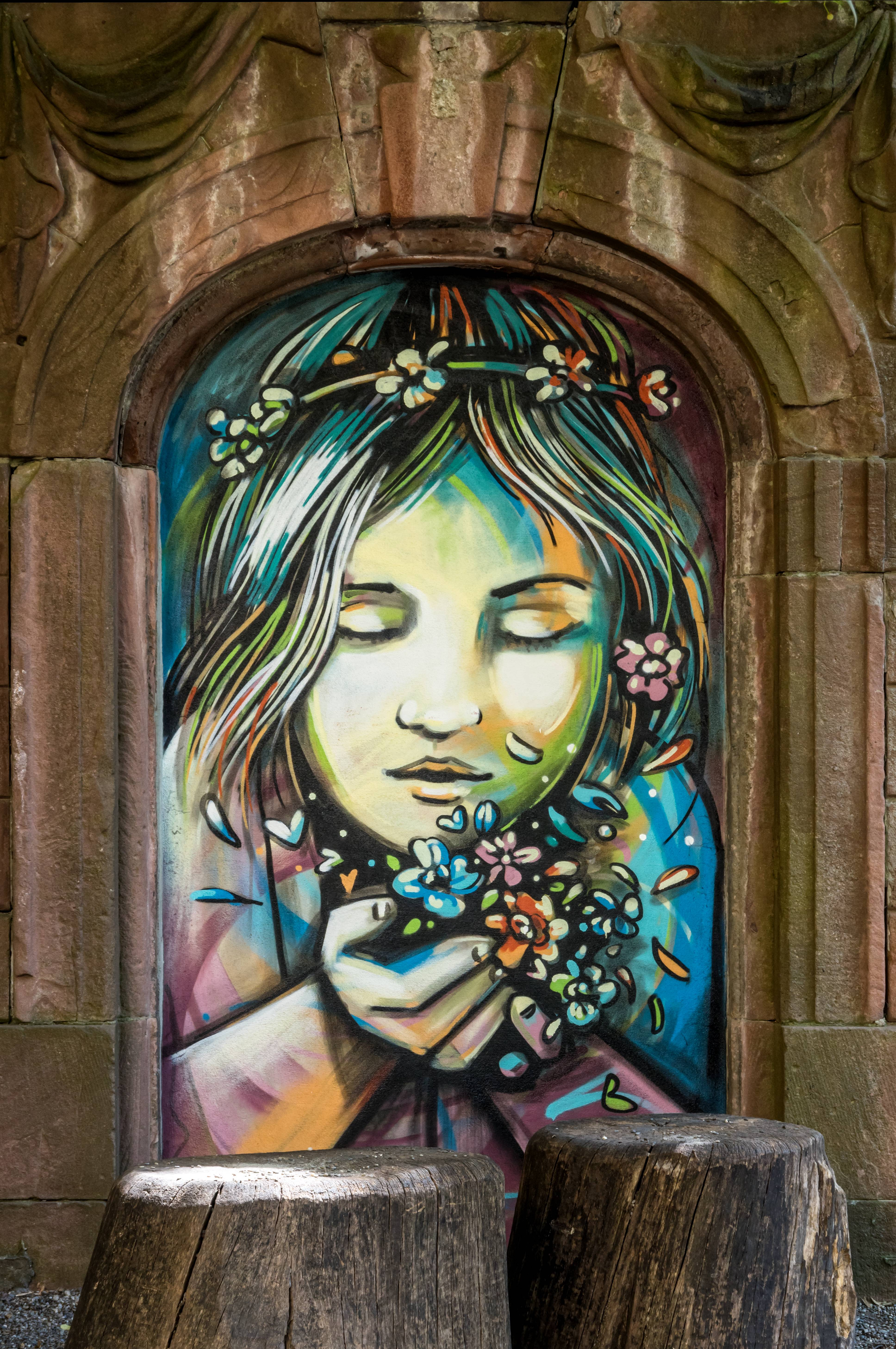 Die neue Ubi Bibliothek nach der Eröffnung Die Street Art und Graffitikünstlerin Alice Pasquani aus Rom verschönert den Spielplatz am Augustinerplatz am 30. und 31. Juli 2015 im Auftrage des Vereins Kulturaggregat aus Freiburg.